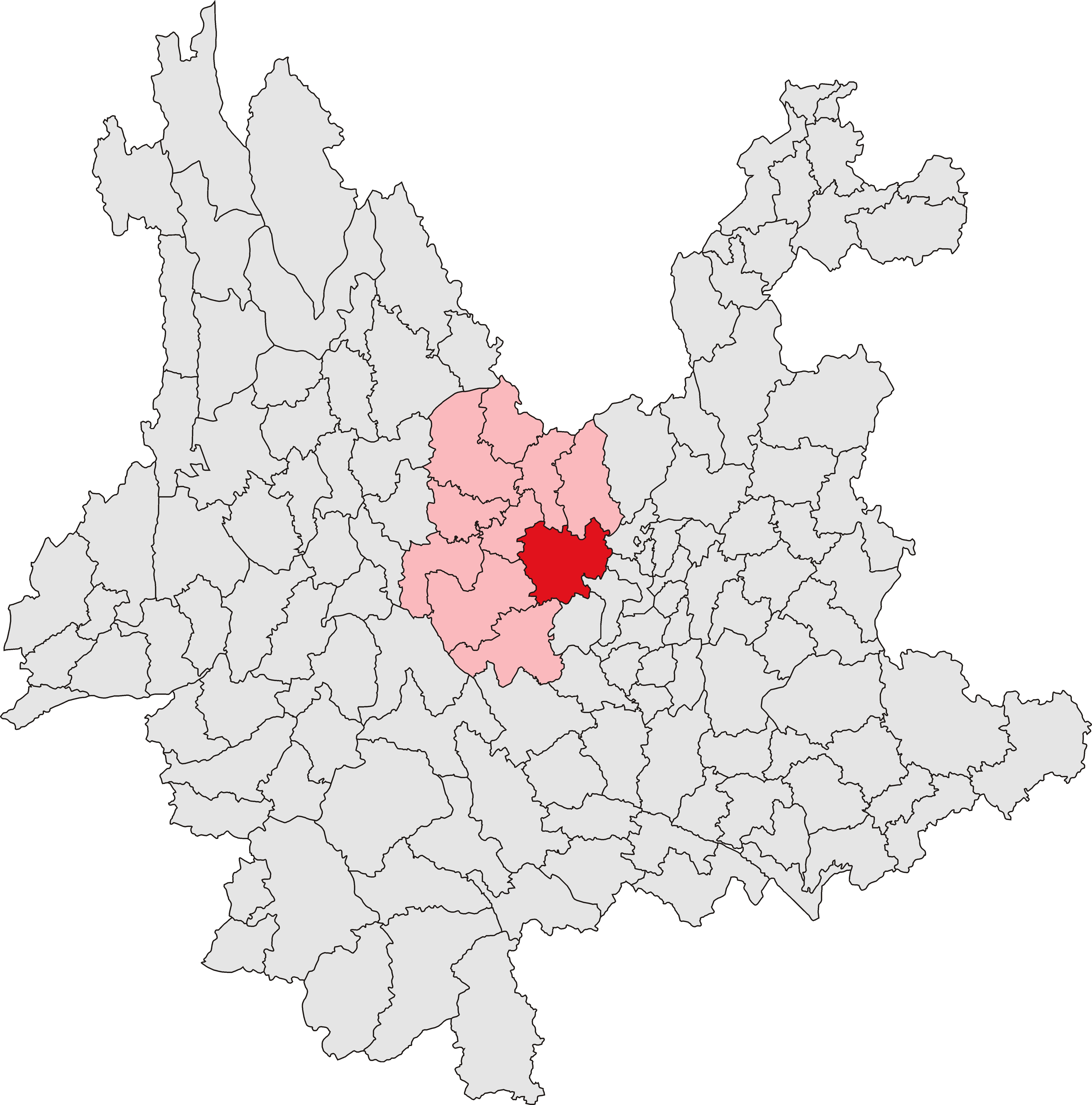 中文（中国大陆）: 禄丰县位置图